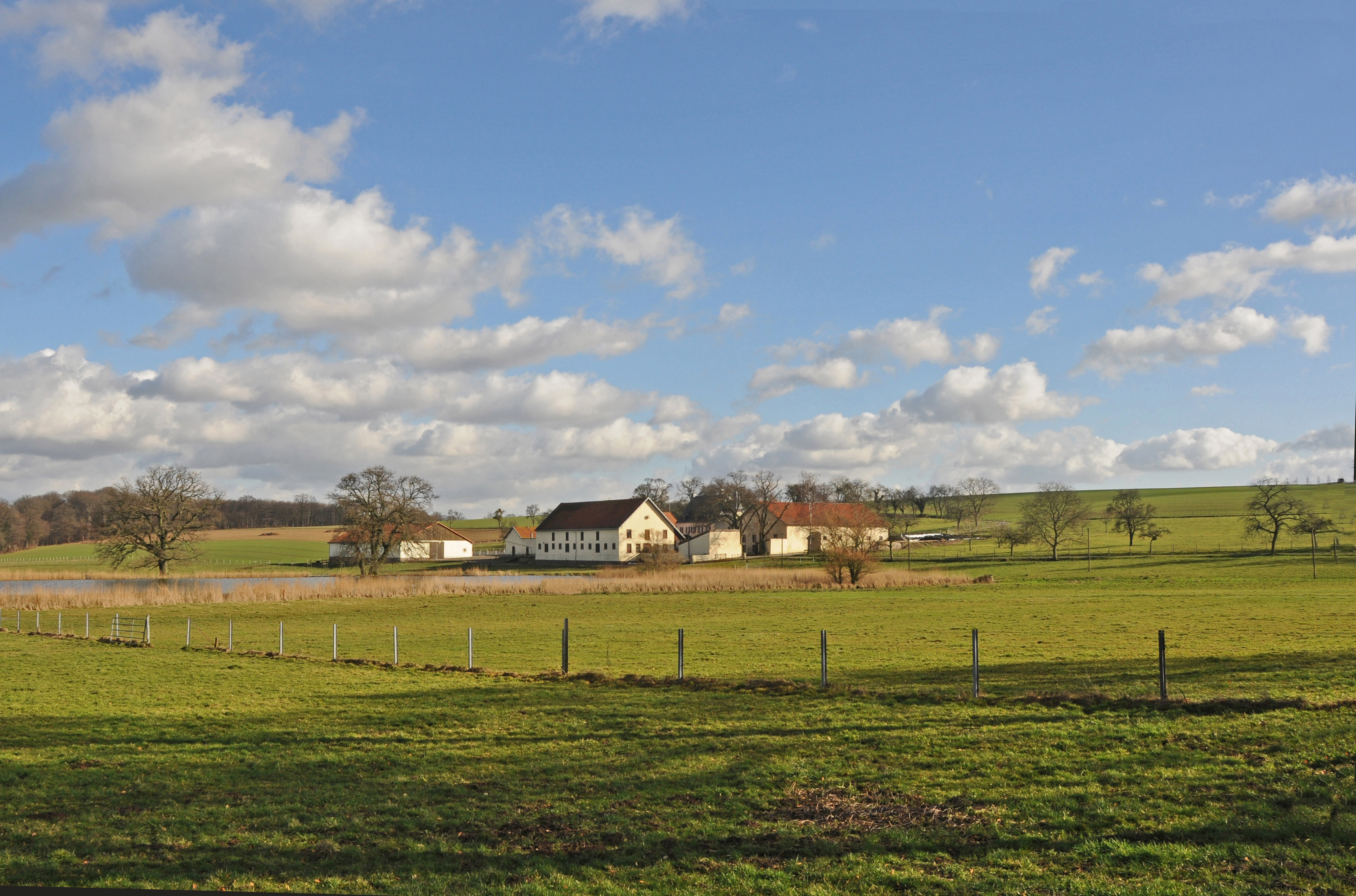 De Pläitrengerhaff.